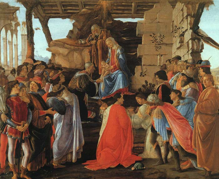 Pintura renacentista